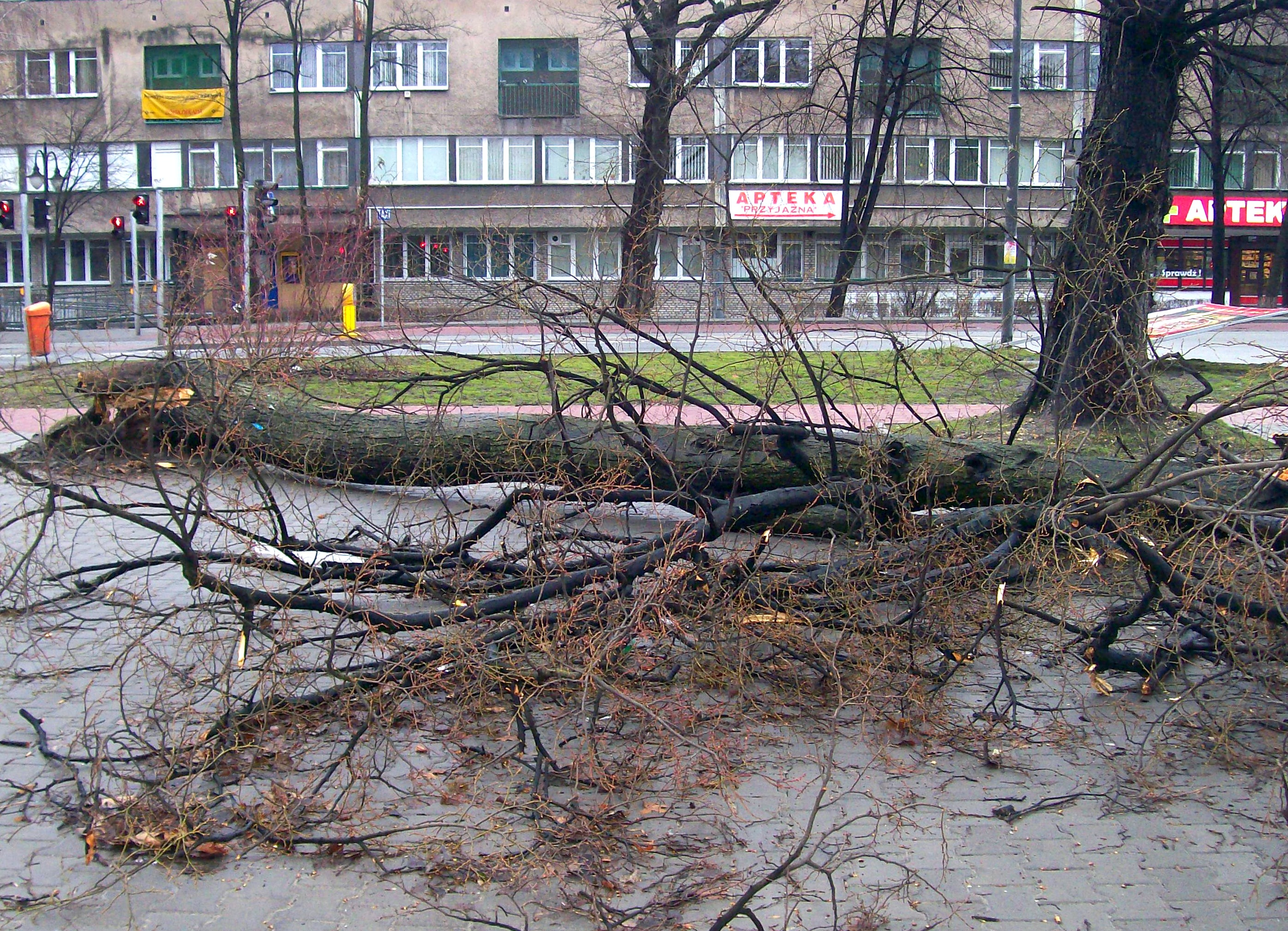 Description:Katowice-Giszowiec ul Mysłowicka - po przejściu orkanu Emma - 02.03.2008. W głębi Górniczy Zespół Lecznictwa Ambulatoryjnego w Katowicach Fundacji Unia Bracka przy ul Mysłowickiej 13. Author:Ewkaa